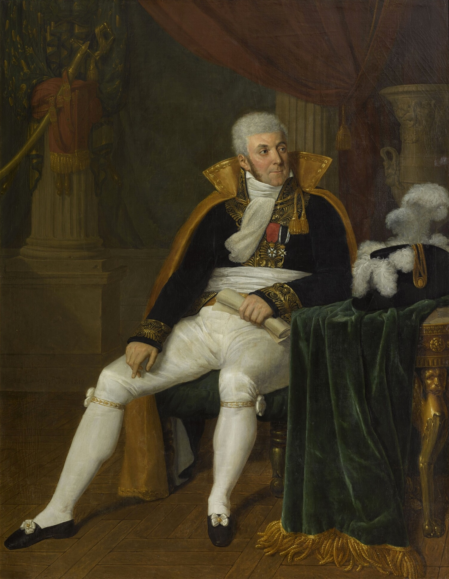 Général de division en 1809, commandant le régiment des chasseurs à pied de la Garde impériale, sénateur en 1807, en costume de sénateur.